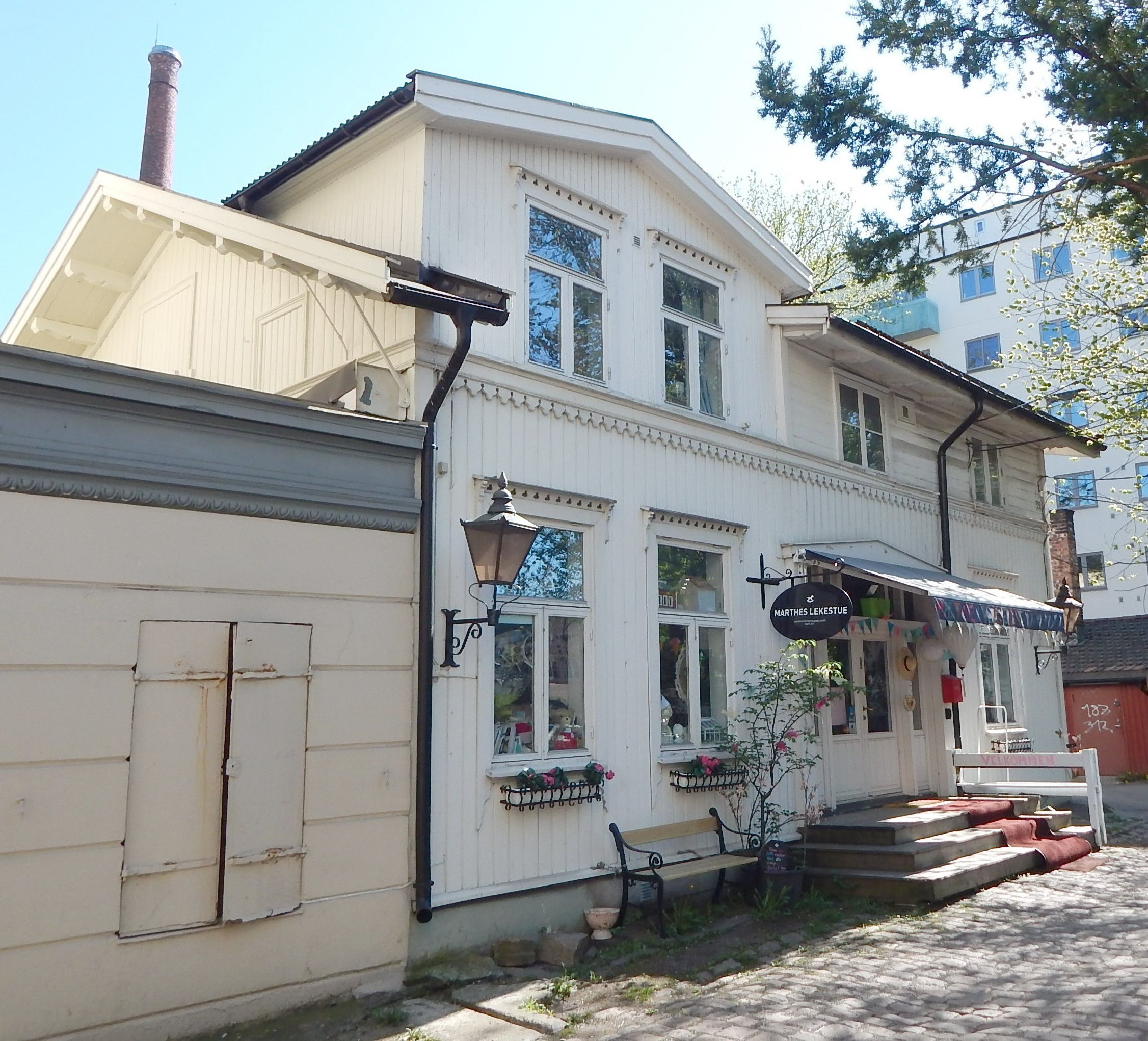 Hus i bakgården i Hagdehaugsveien 28